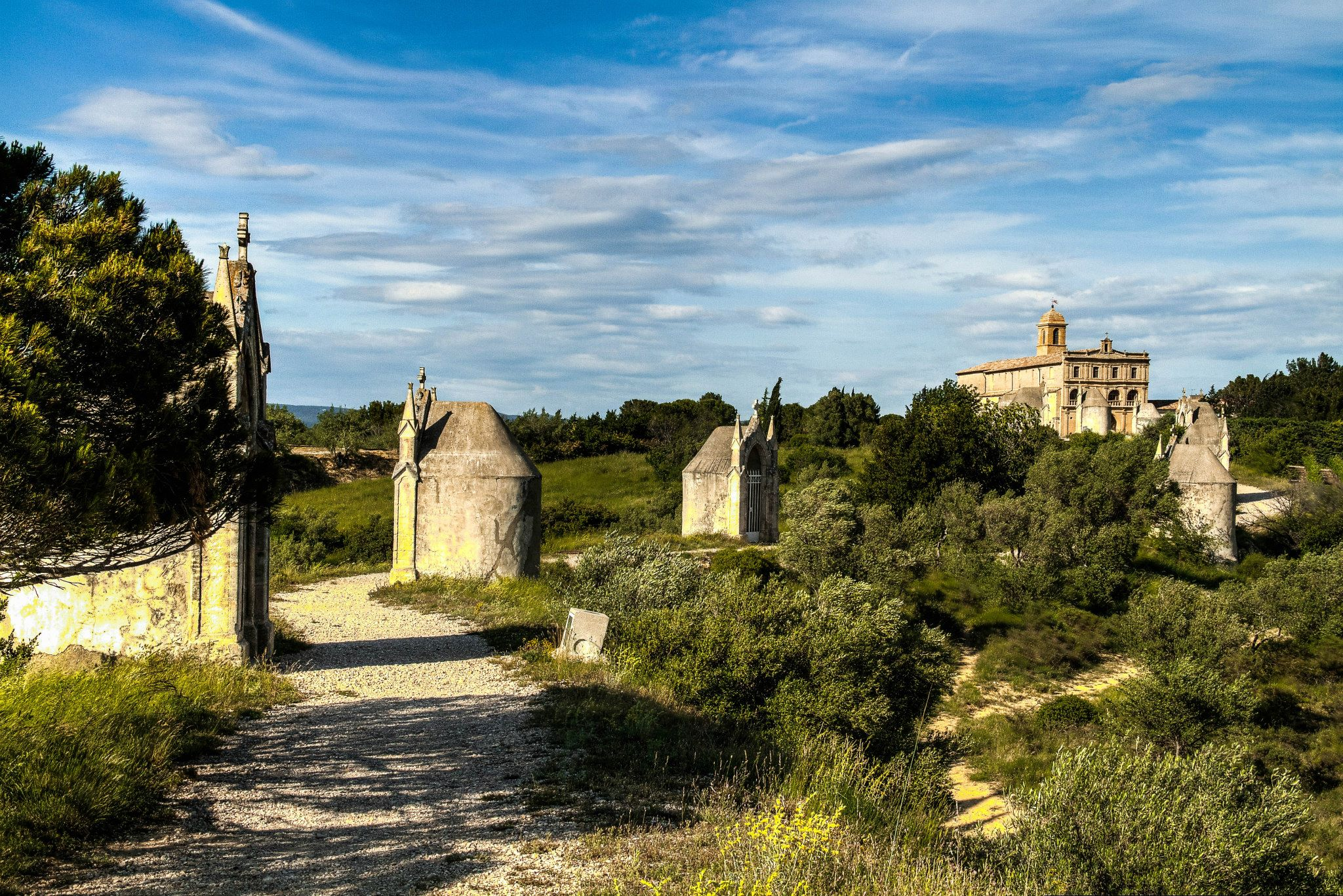 Chemin de Croix de Gignac. Au fond, Notre-Dame-de-Grâce. Hérault, France.